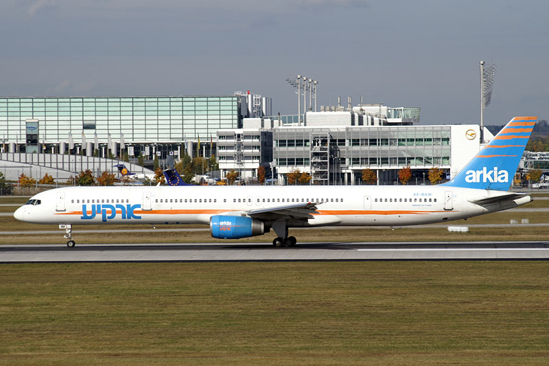 Arkia Israel Airlines Boeing 757-300 4X-BAW